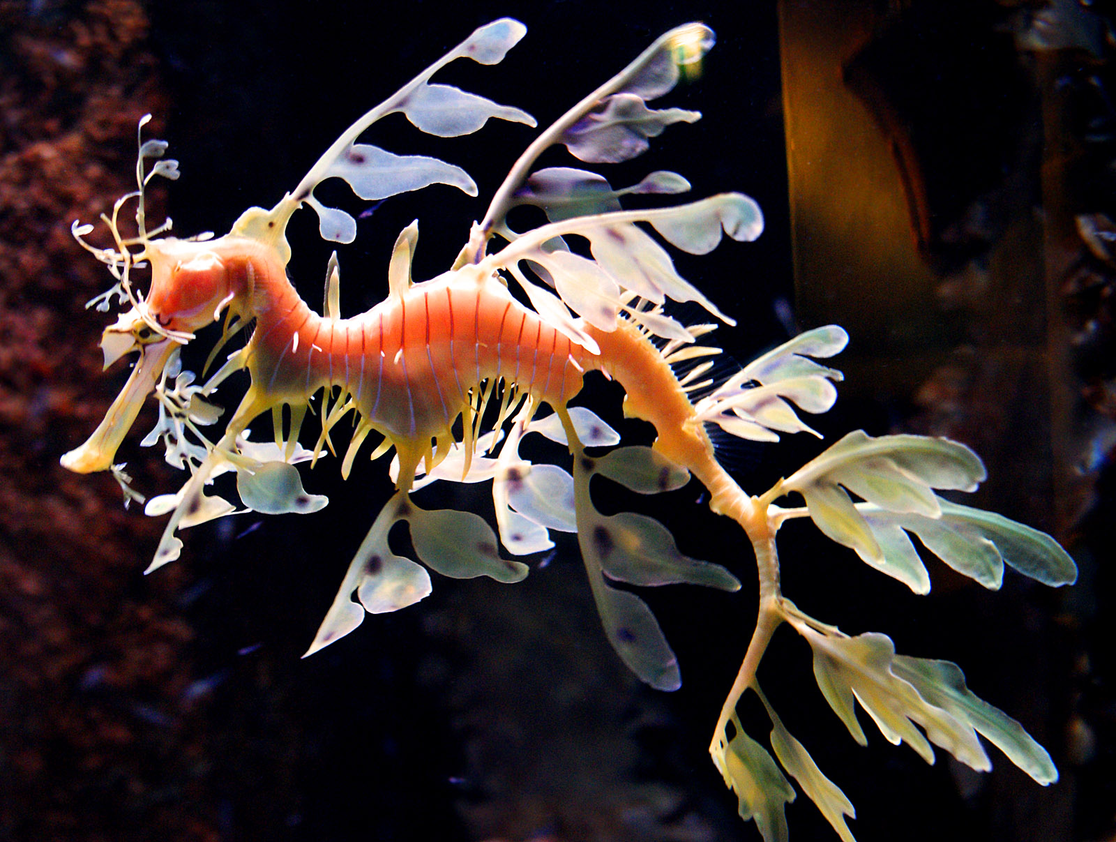 Großer Fetzenfisch im Sea Life, München